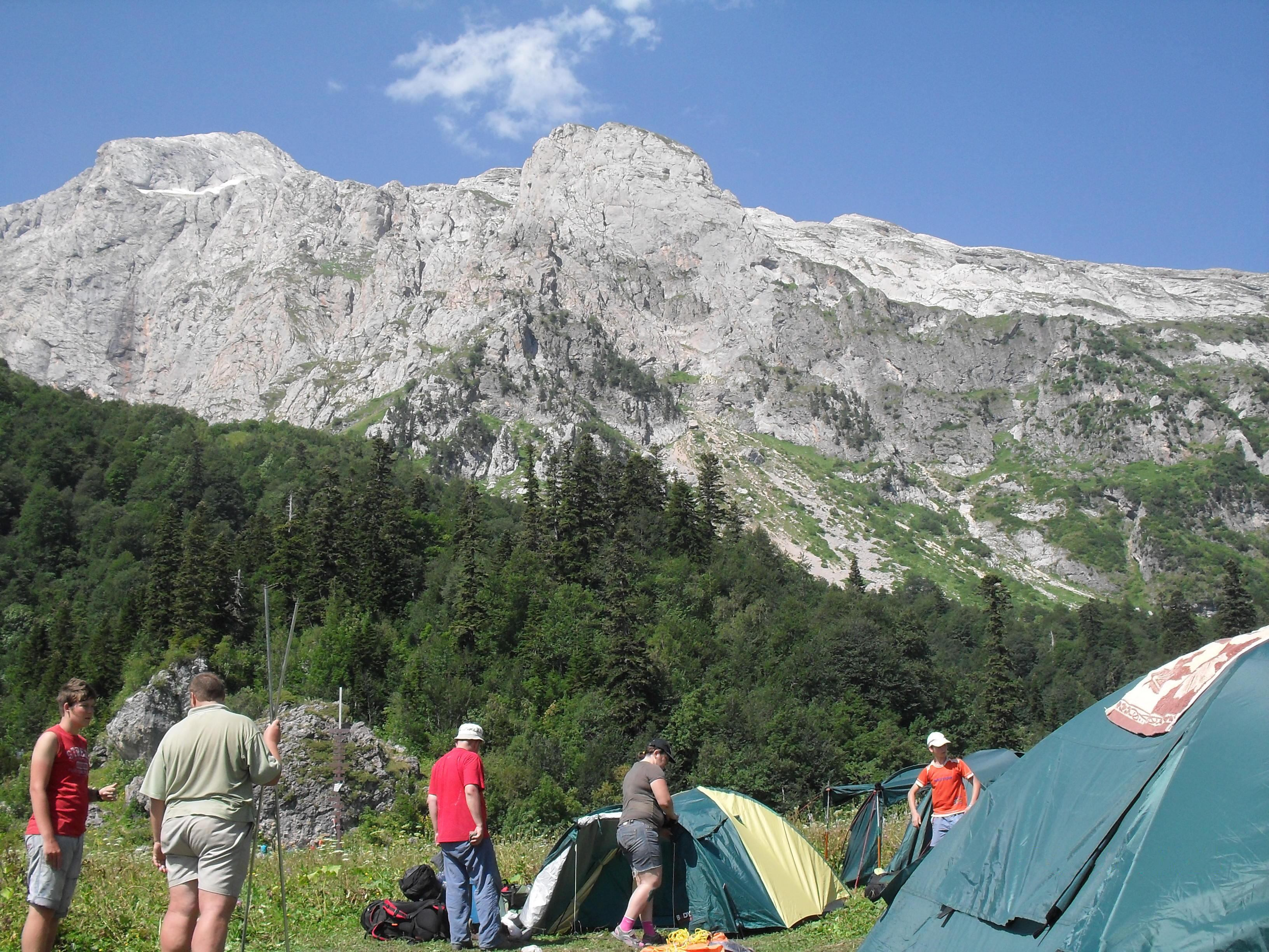 Приют Фишт на фоне гор